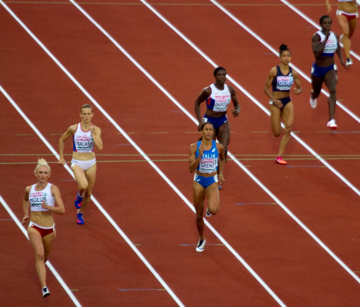 5266 finale 400m dames